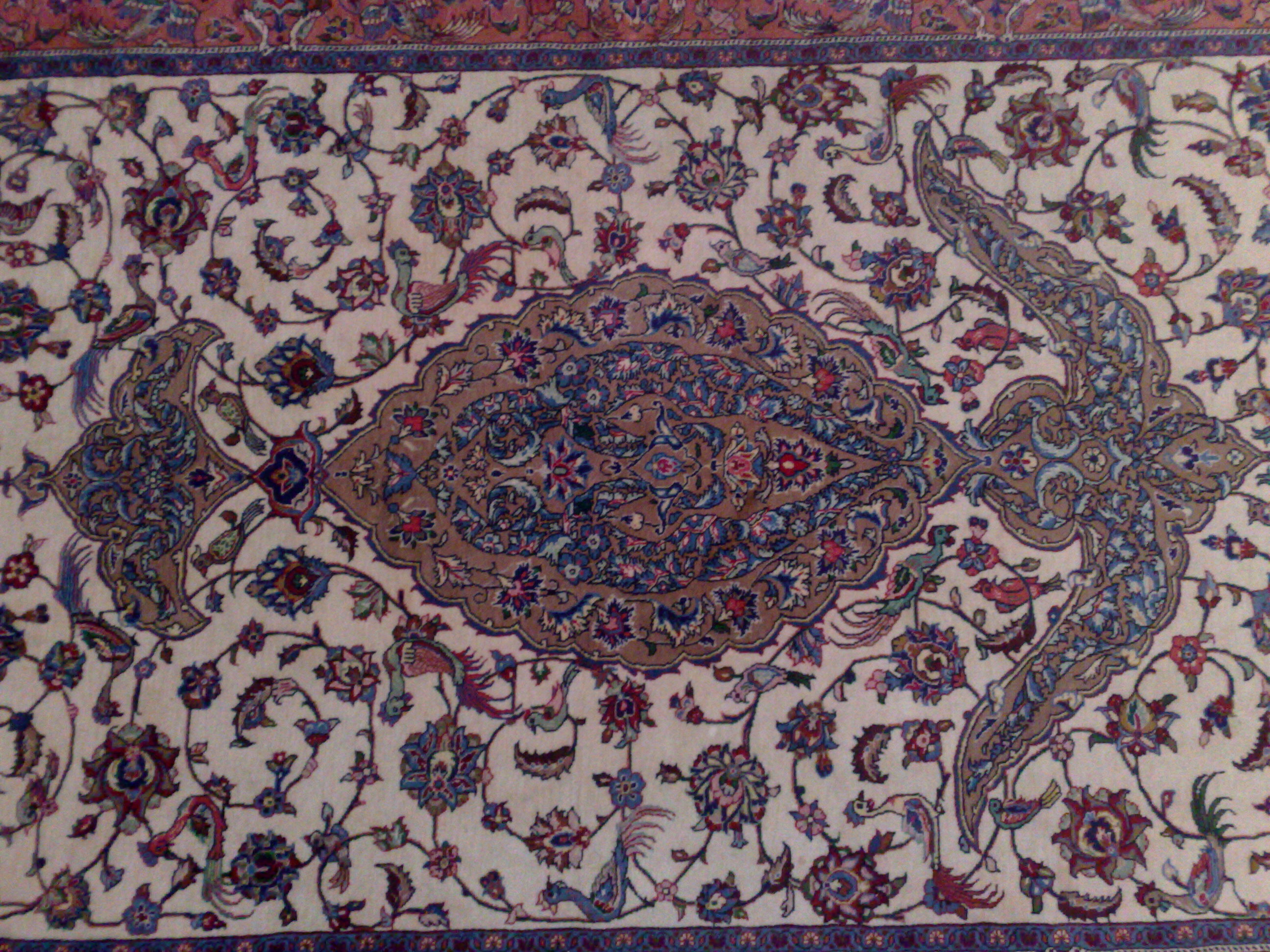 طرحی از عیسی خان بهادری